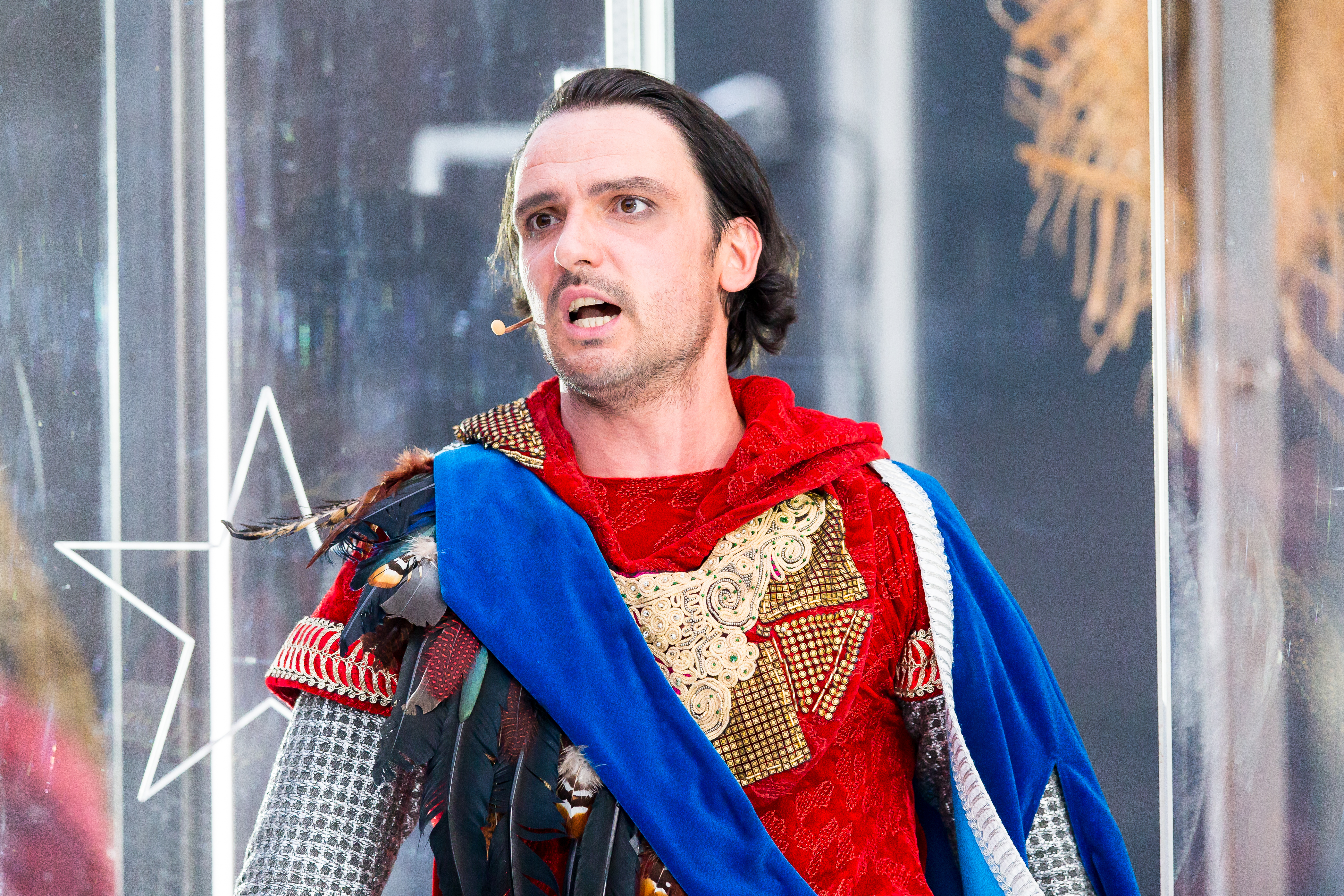 2016: Uraufführung: "GOLD. Der Film der Nibelungen" Regie: Nuran David Calis Autor: Albert Ostermaier Intendant: Nico Hofmann --- Ensemble: Produzent Konstantin Trauer: Uwe Ochsenknecht Regisseur Arsenij Kubik: Vladimir Burlakov Drehbuchautor Charlie P. Weide: Josef Ostendorf Society Reporter Peter Scheumer: Dominic Raacke Kamerafrau "the eye": Anna Rot Setdesignerin "set": Joy Maria Bai Assistentin des Produzenten Carmen: Alexandra Kamp Maskenbildnerin Sueyla Blume : Ayse Bosse die Ältere Kriemhild Karina Bergmann: Katja Weitzenböck die Jüngere Kriemhild Simone Gehel: Constanze Wächter die Ältere Brünhild Lotte Jünger: Michaela Steiger die Jüngere Brünhild Nathalie Aurun: Dennenesch Zoudé Siegfried Mohamad Söder: Ismail Deniz Hagen René Inner: Sascha Göpel Gunther Klaus Castel: Maximilian Laprell Bürgermeister Franz Koppoler: Heiner Lauterbach during Nibelungenfestspiele "GOLD. Der Film der Nibelungen" at Wormser Kaiserdom, Worms, Rheinland Pfalz, Germany on 2016-07-12, Photo: Sven Mandel